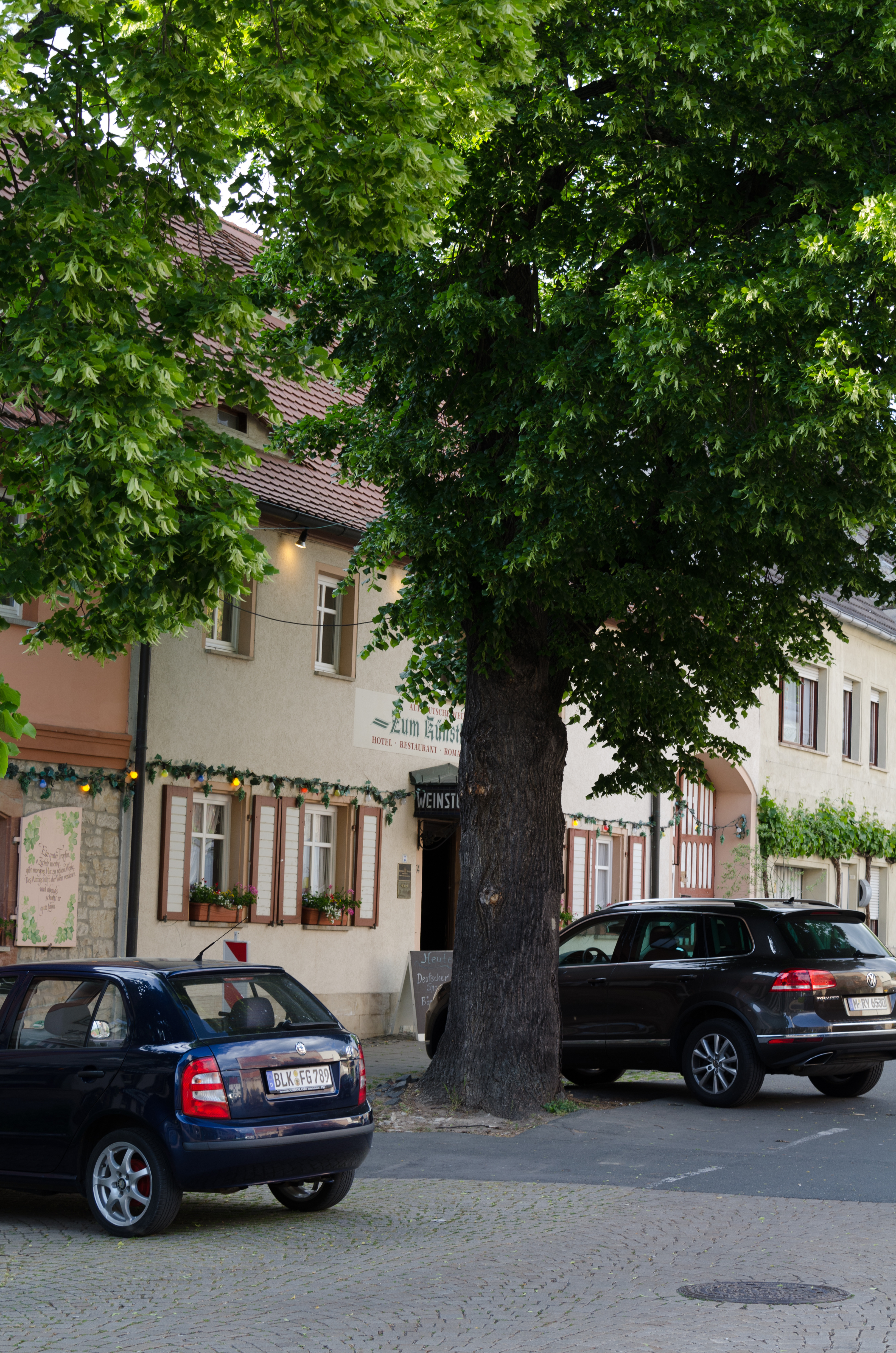 Freyburg an der Unstrut, Breite Straße 14